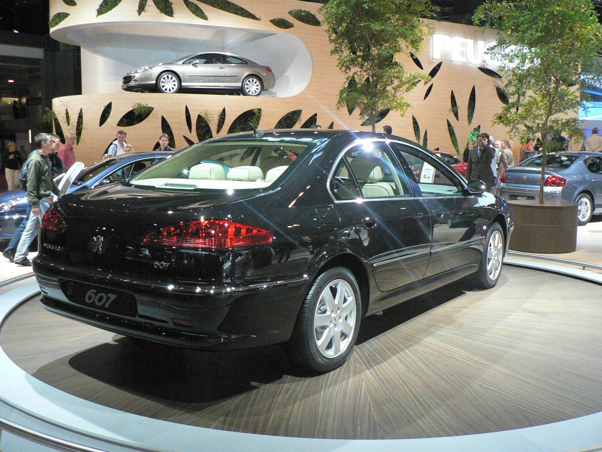 Mondial de l'automobile, Paris 2006